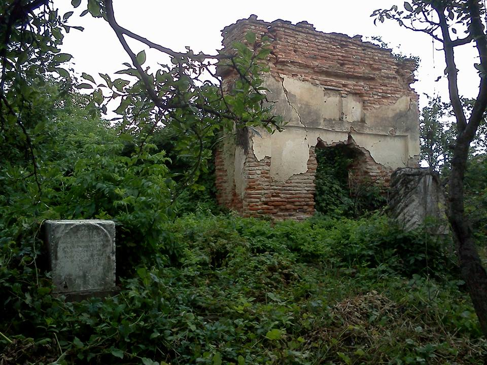 Ruinele bisericii „Sf. Visarion”